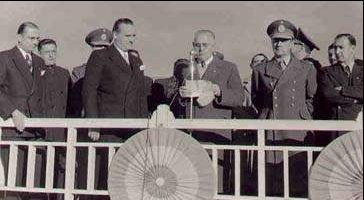 Ingeniero Teodoro Platz (Administrador YPF - Yac. Comodoro) habla en acto 25 de mayo de 1949. A su izquierda el General Julio A. Lagos